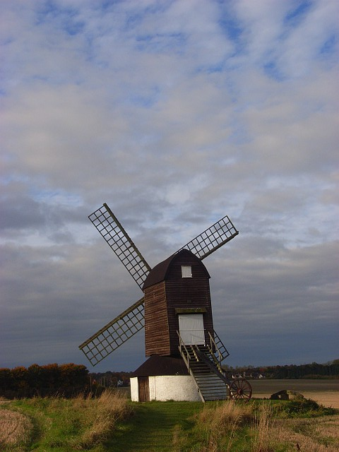 Pitstone Windmill